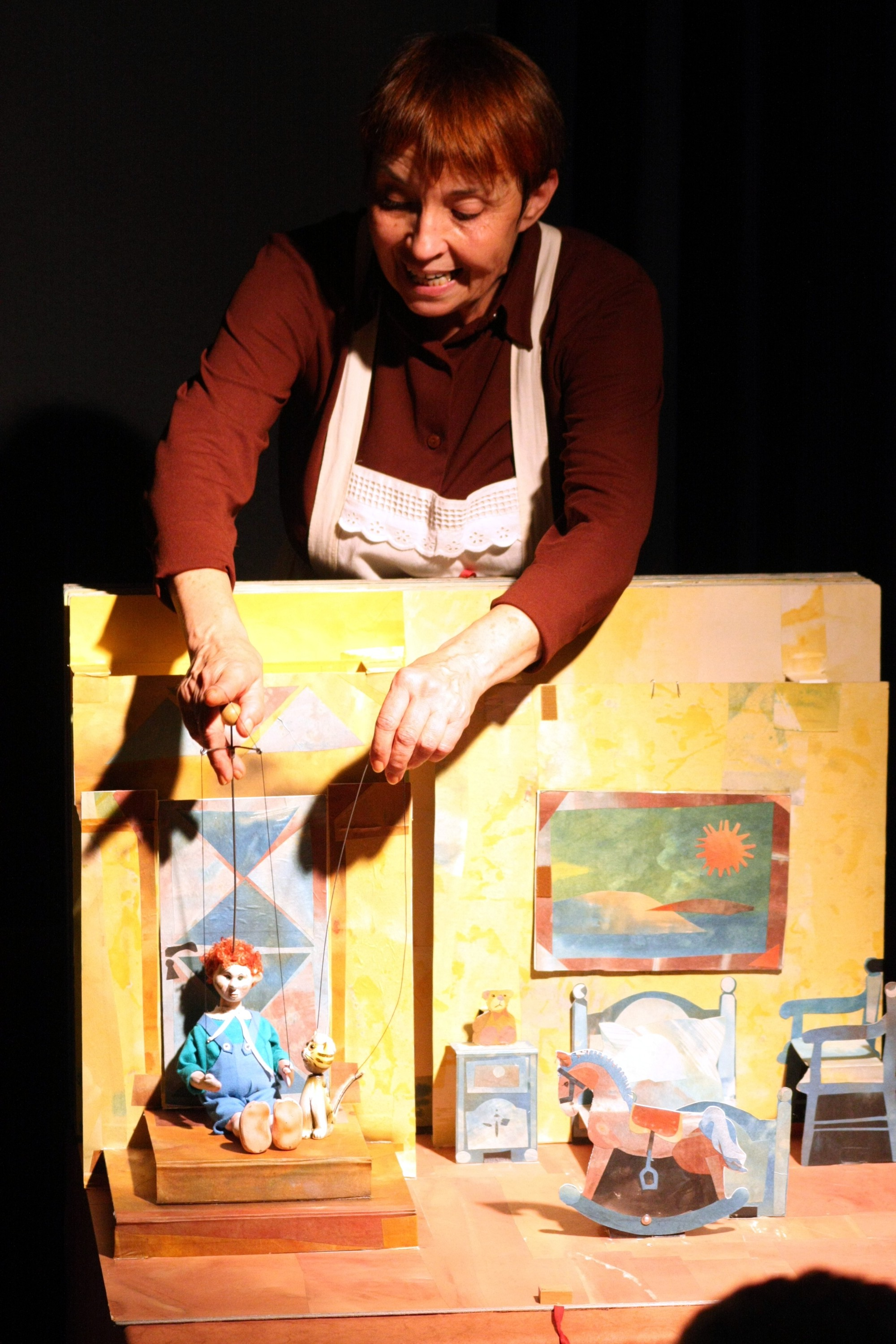 Rosi Lampe: Szenenfoto aus dem Stück "Stein und Rose" nach Theodor Storm